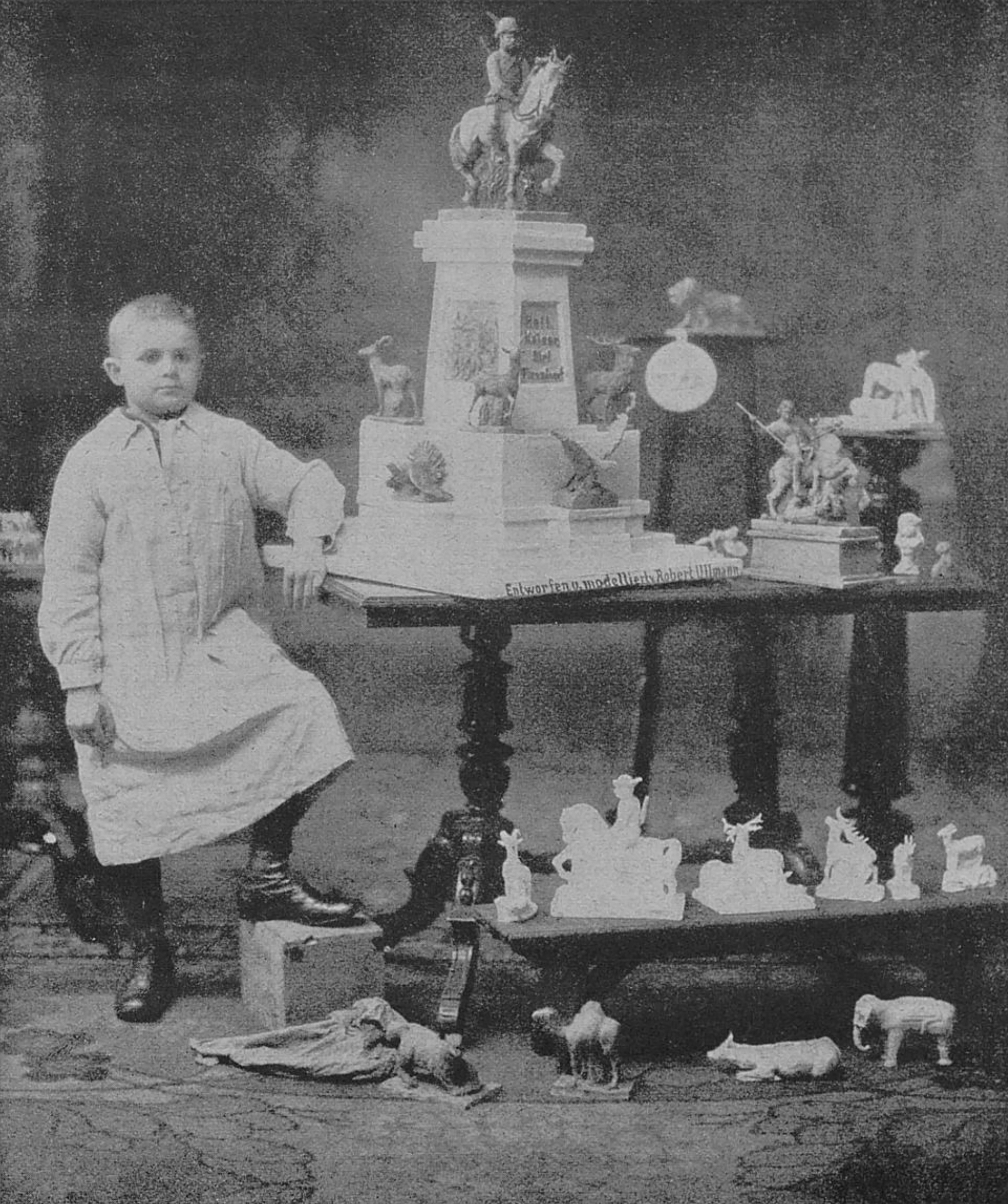 Der zehnjährige Robert Ullmann inmitten seiner "Werke". Der Knabe, Sohn des Graveurs Ullmann in Hilden (Anmerkung: korrekt ist Mönchengladbach), hat seit seiner frühen Kindheit aus eigenem Antrieb gezeichnet und Silhouetten geschnitten; seit seinem 5. Jahre modelliert er in Ton, zumeist ohne Vorbild aus der Phantasie. Da die Eltern unbemittelt sind, wäre zu wünschen, dass sich ein Mäzen für den Knaben fände. (Rhein und Düssel, den 22.November 1913)